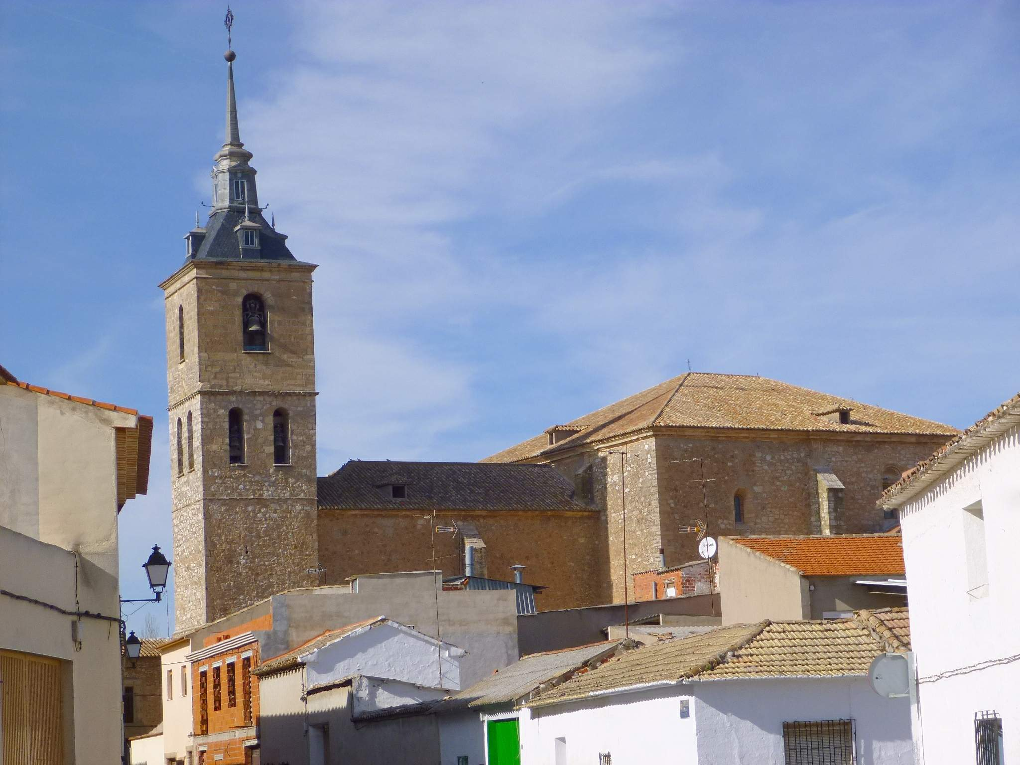 Iglesia de Nuestra Señora de la Asunción (Socuéllamos, Ciudad Real)